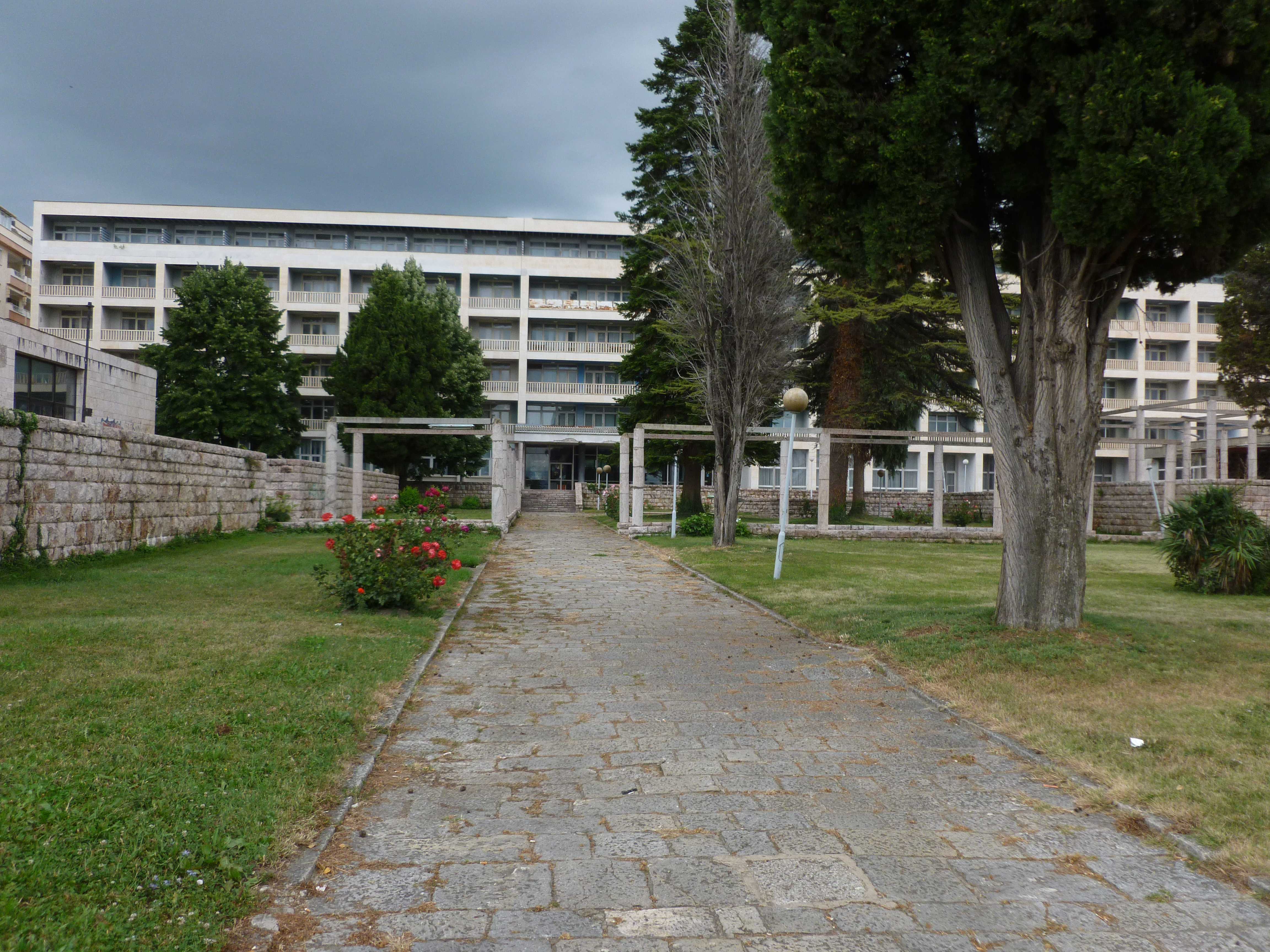 Macedonia